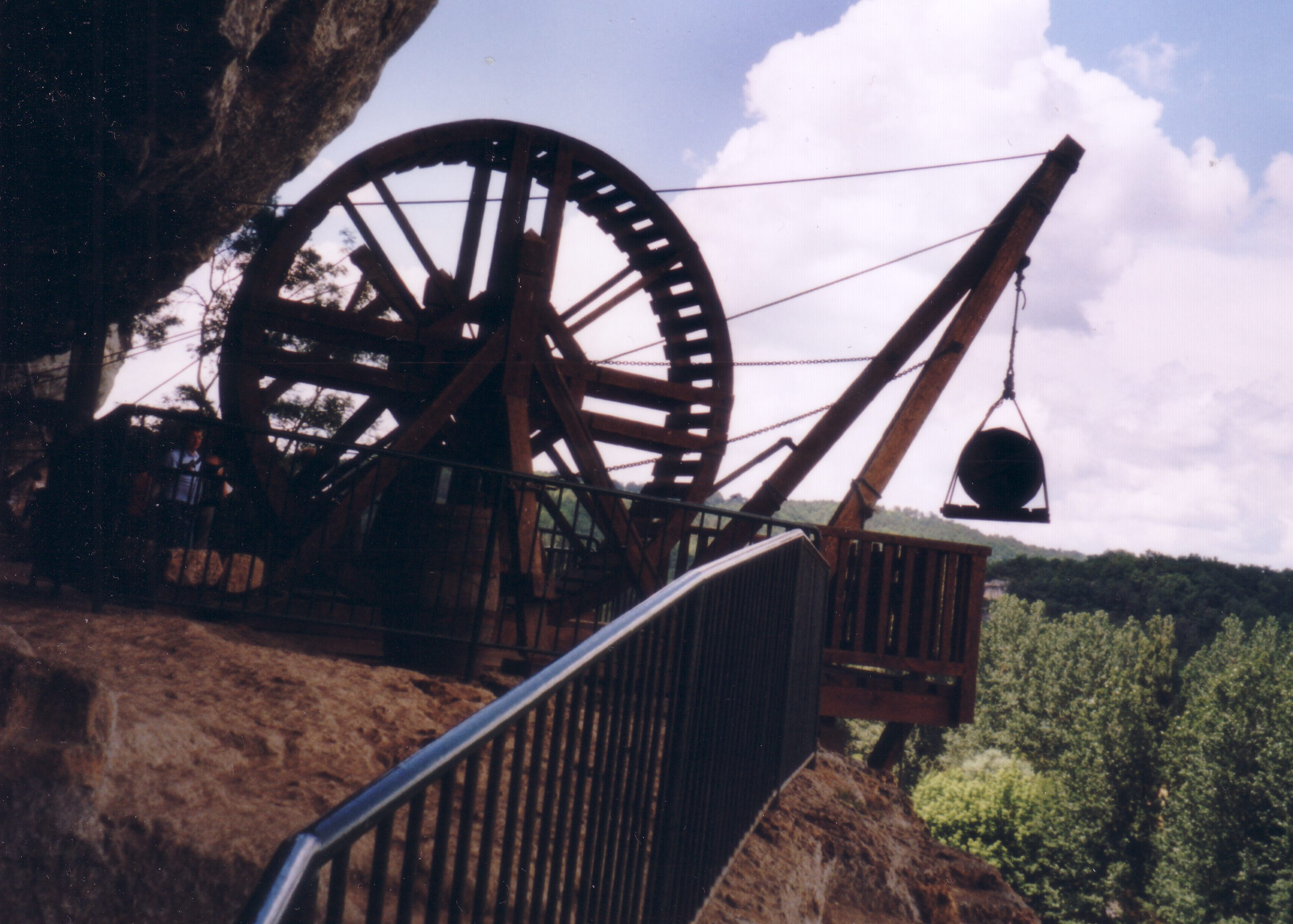 La Roque Saint Christophe - treuil de puits, reconstitution d'un chantier médiéval